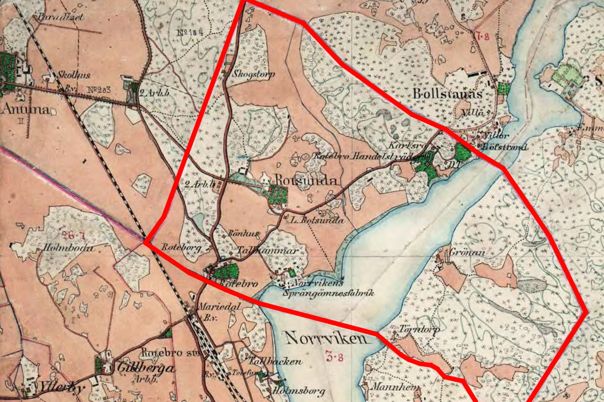 Rotsundas ägor på Häradsekonomiska kartan